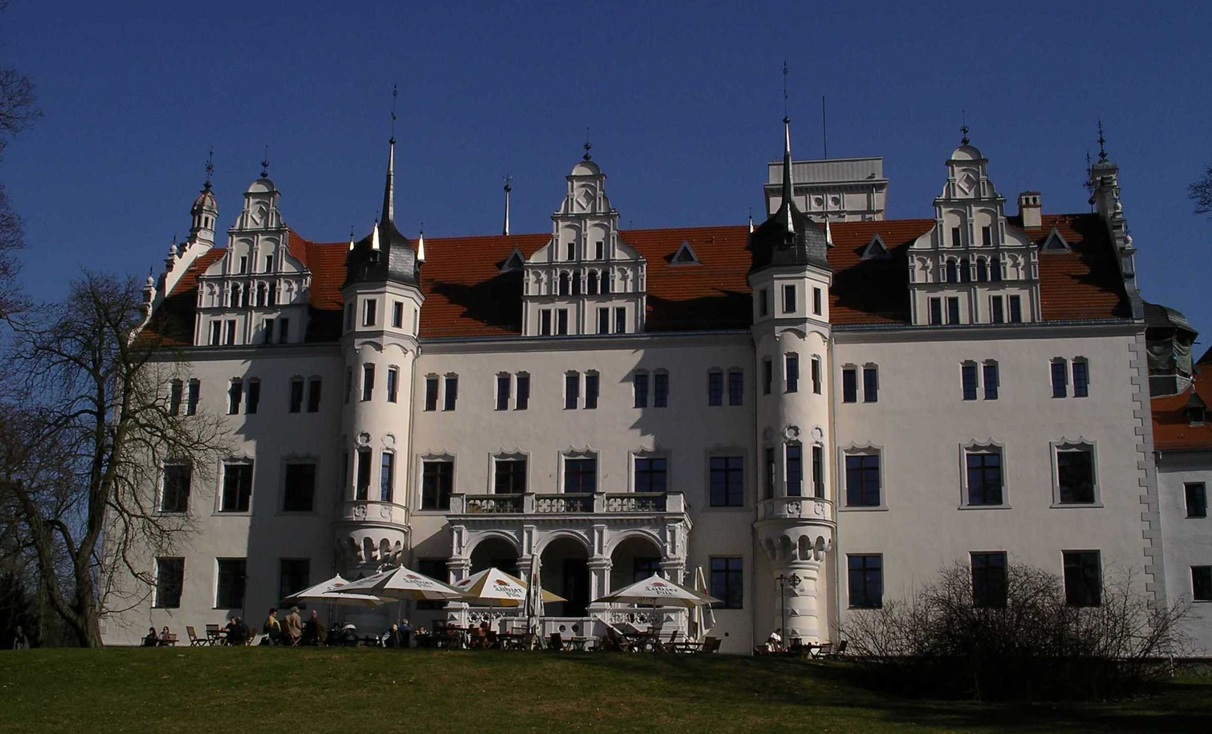 Schloss Boitzenburg in der Uckermark, Ansicht von der Seeseite (Boitzenburg Castle, Uckermark, Northern Germany - view from rear / Lake side)